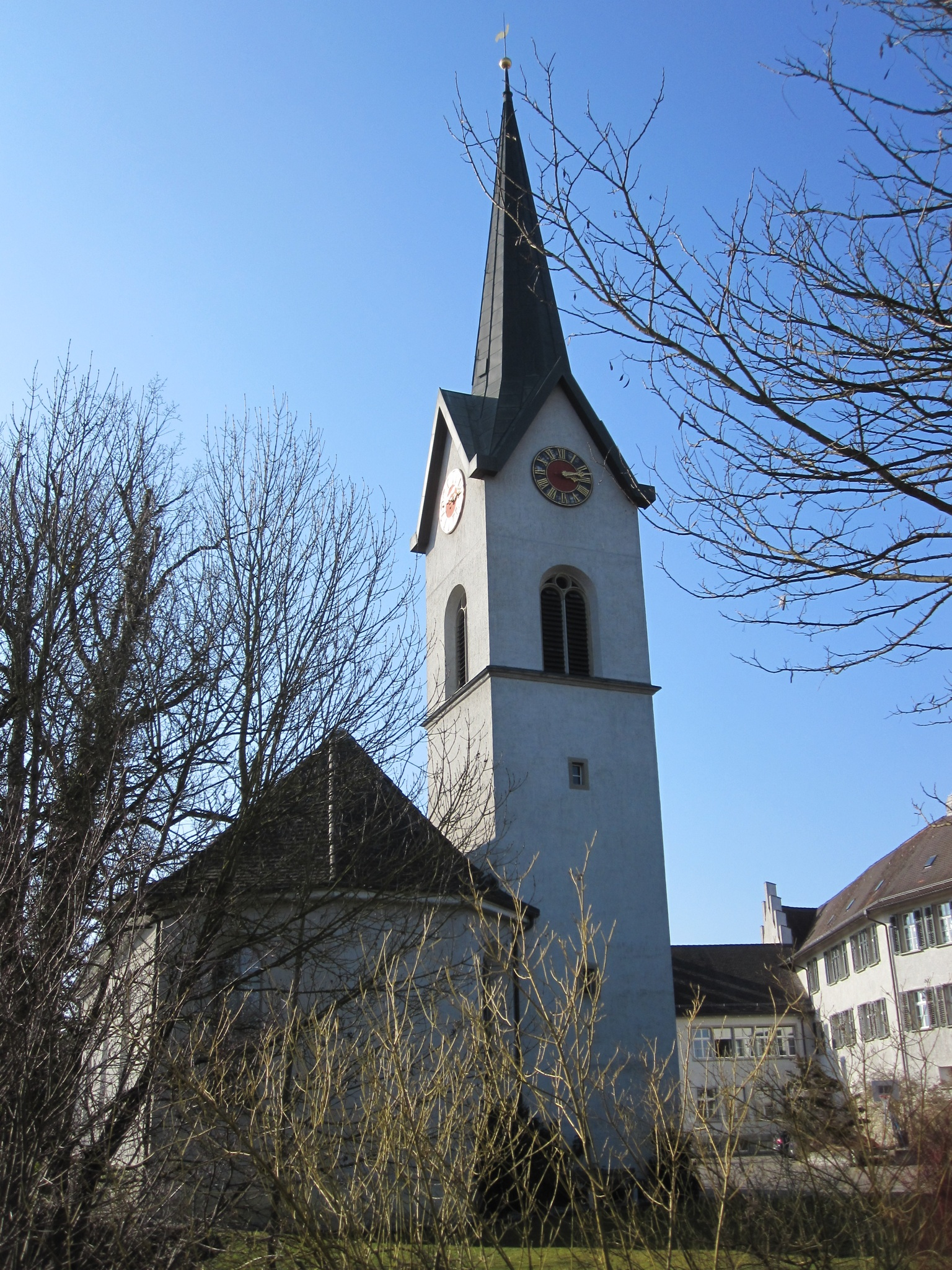 reformierte Kirche in Bürglen (Kanton Thurgau)